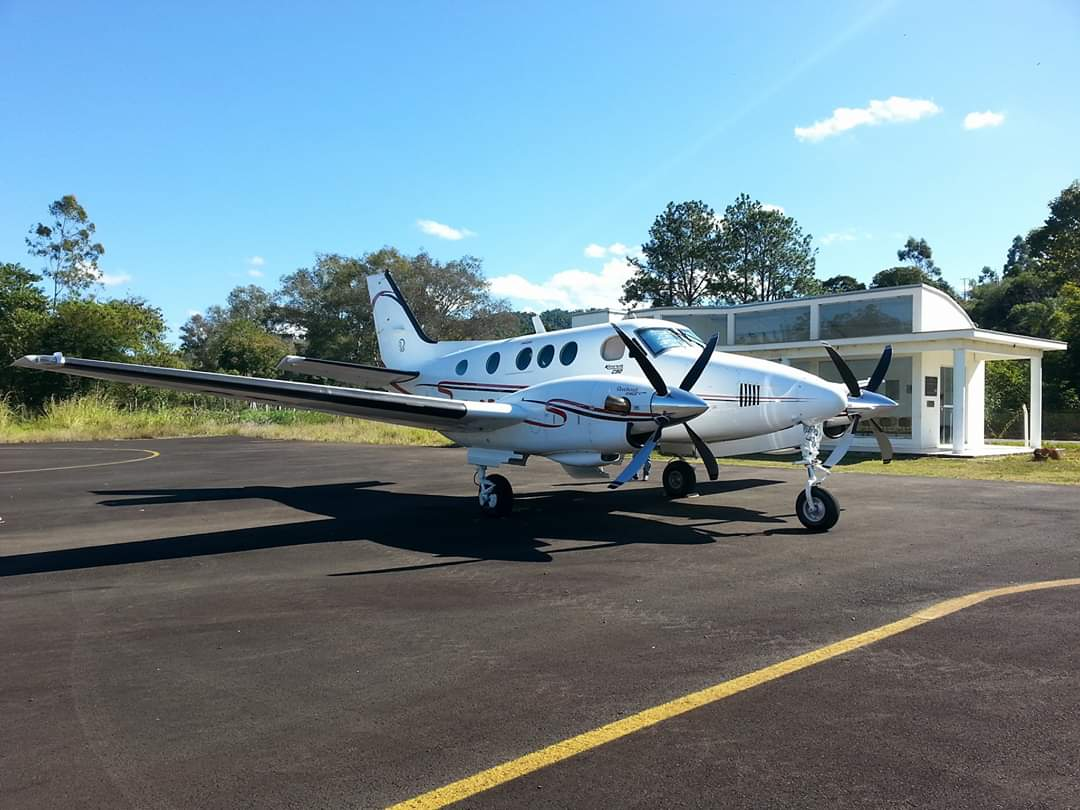 Area de embarque e desembarque no areporto de ouro fino